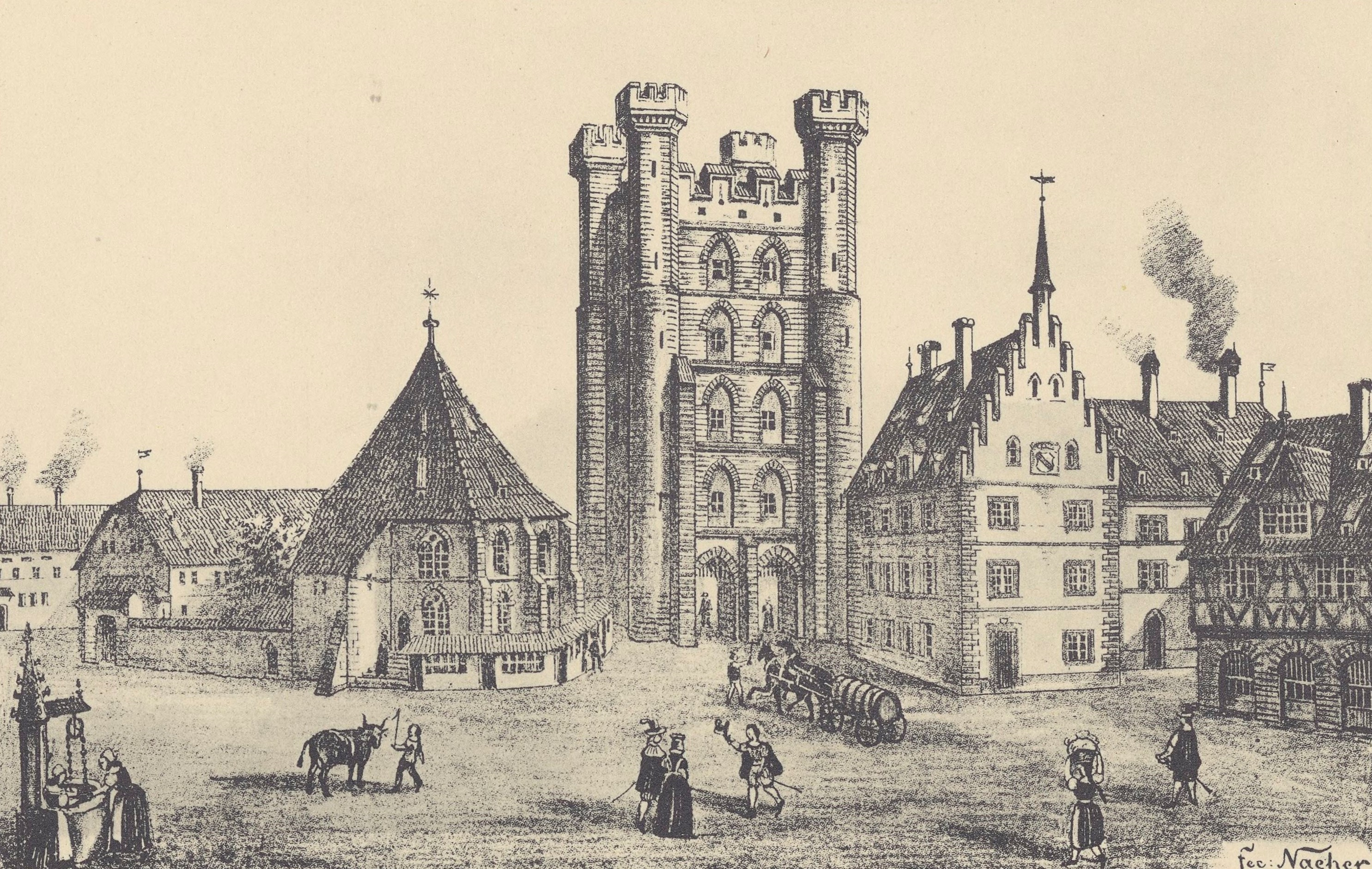 Blick über den Place Kléber und den Pfennigthurm im Strasburg des 16. Jahrhunderts